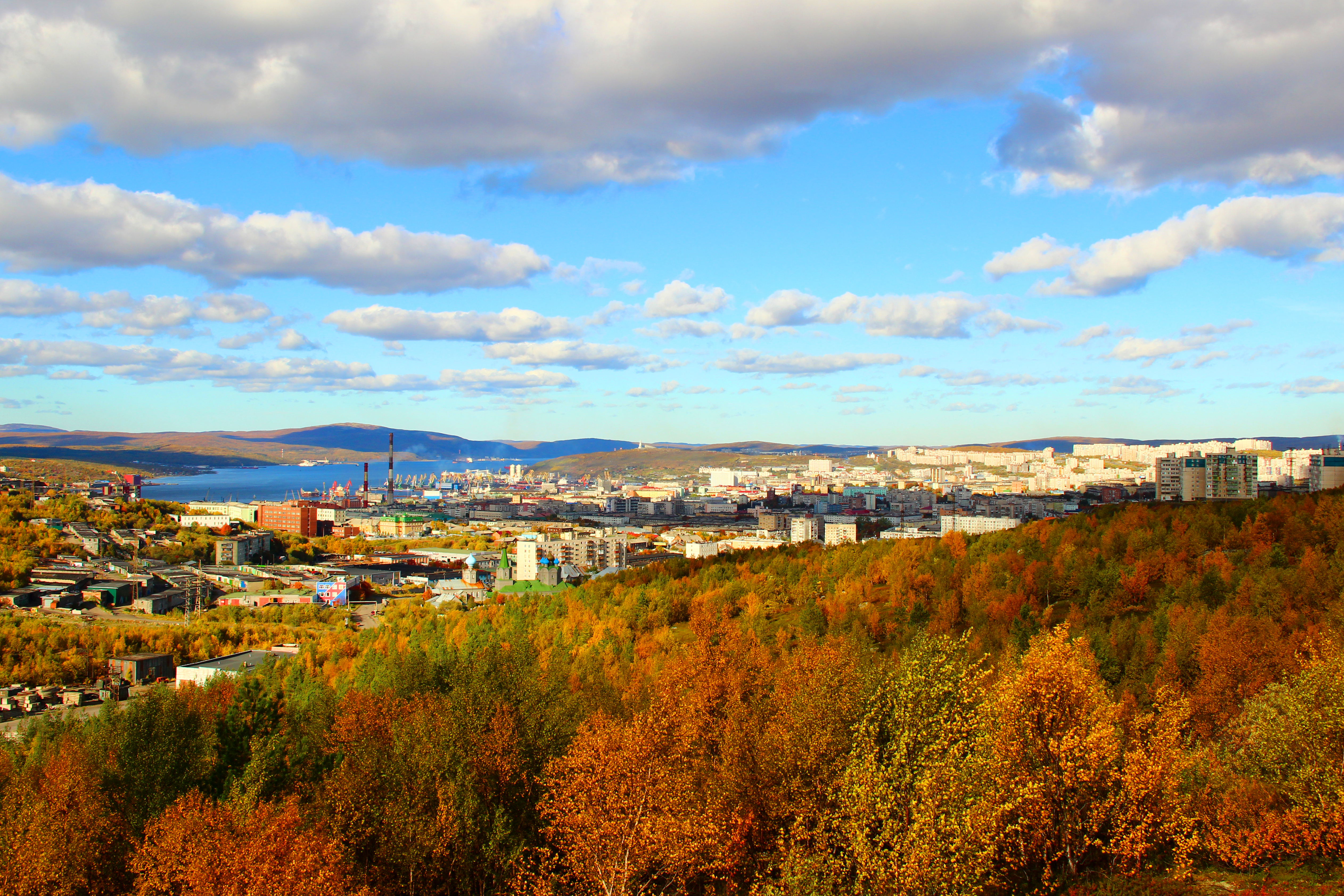 Вид на Мурманск с сопок.